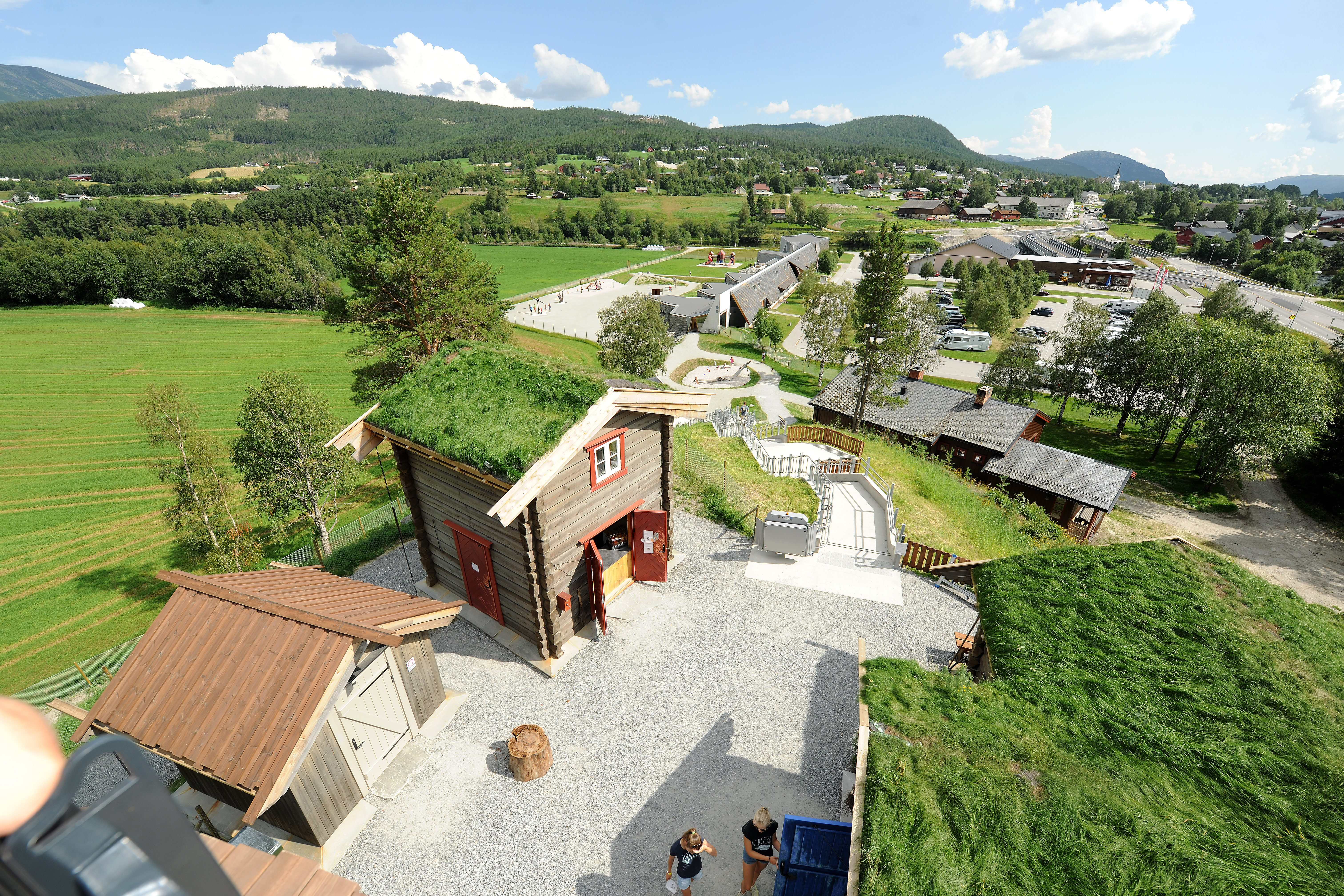 Aukrustsenteret sett fra Flåklypatoppen